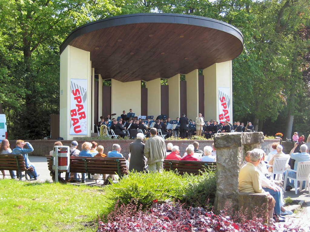 Wilhelmshaven, Kurpark, Eröffnung der Kurkonzertsaison durch das Marinemusikkorps Nordsee